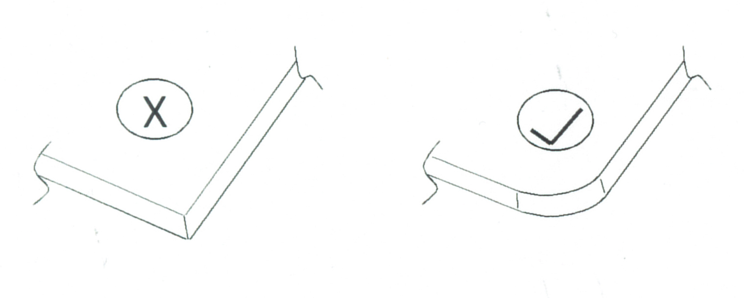 கூர்மையான வடிவமைப்பு